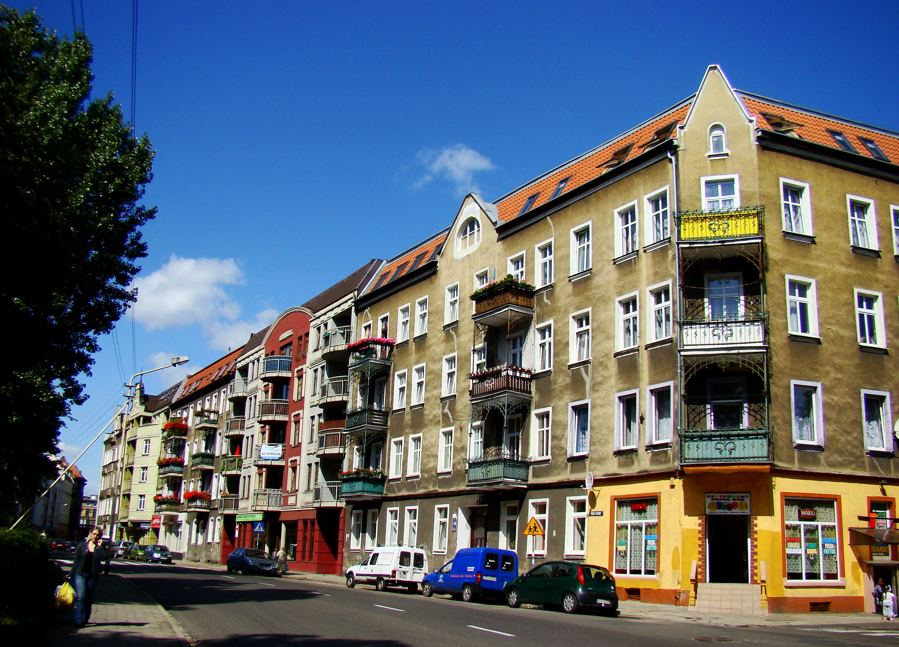 Szczecin-Grabowo, Polska